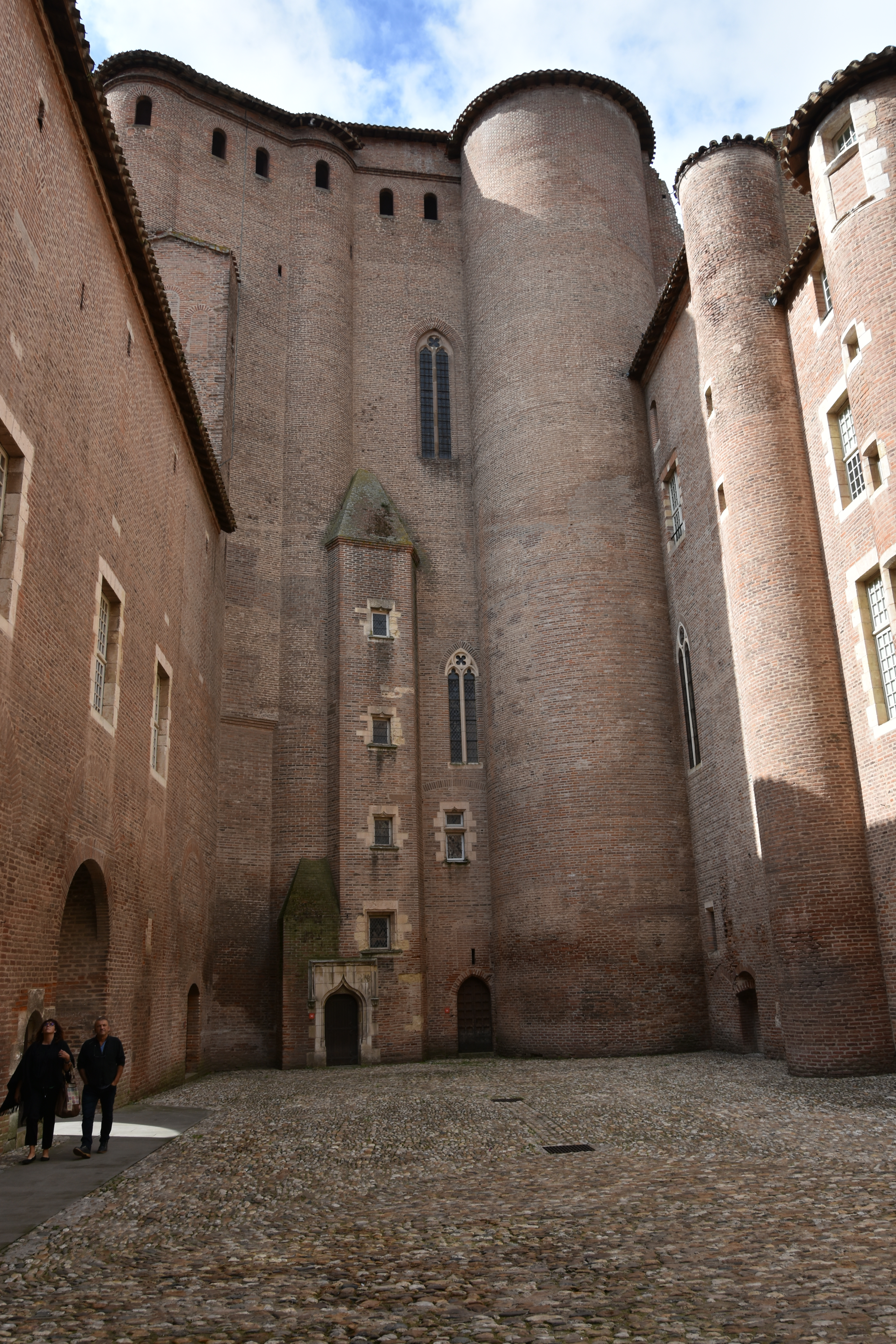 Palais de la Berbie Albi 9-10-2019 14-45-55